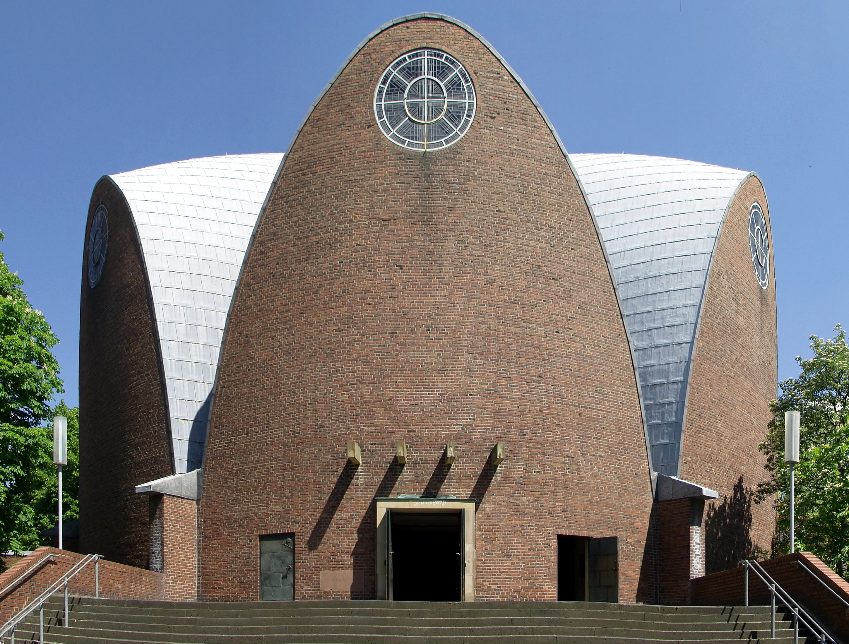 Denkmalgeschützte Kirche St. Engelbert, Köln-Riehl. Architekt: Dominikus Böhm